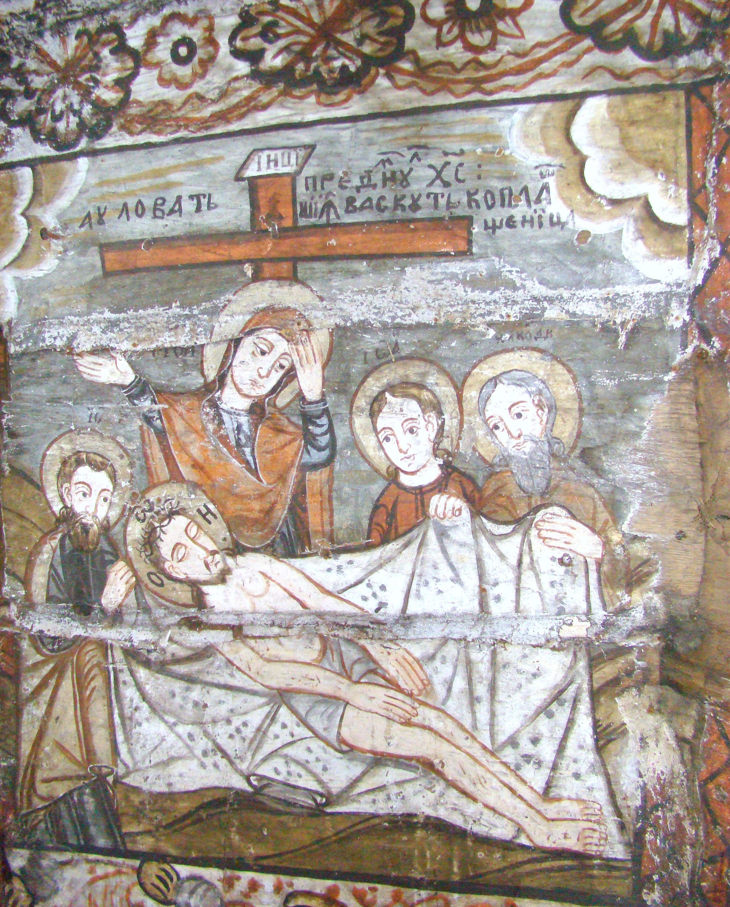 Biserica de lemn „Nașterea Maicii Domnului” din Călinești-Căeni, județul Maramureș